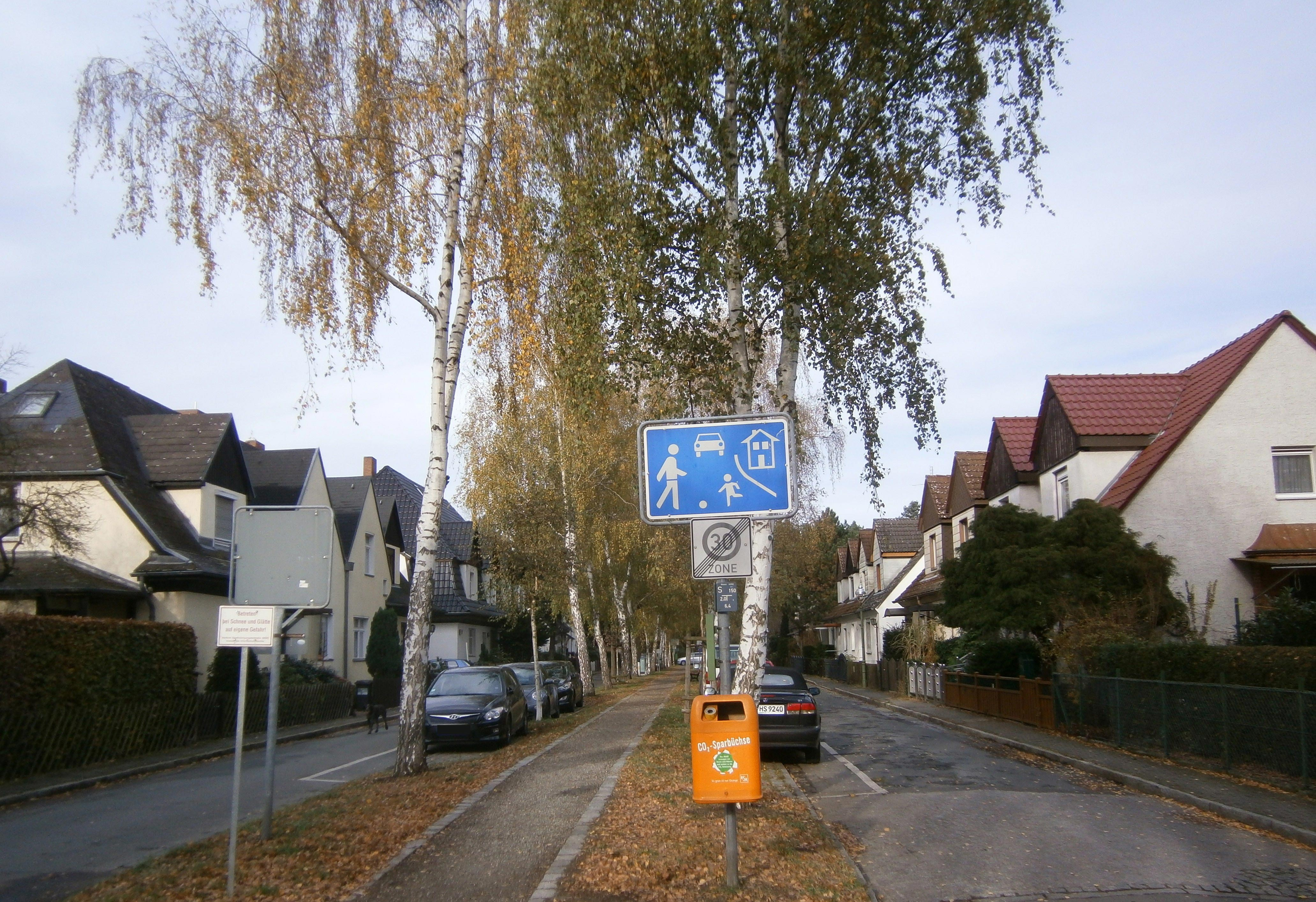 Birkenweg ist eine Straße im Berliner Ortsteil Hakenfelde.